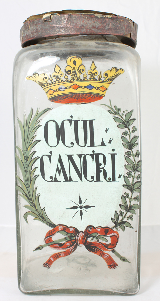 Hohe, vierkantige Apothekerflasche mit Schild (oval, schwarze Schrift auf weißem Grund) "OCUL. / CANCRI."; das Schild ist überkrönt und am unteren Rand bindet eine rote Schleife die das Schild umrahmenden Pflanzenzweige, Papierdeckel. Oculi cancri = Kreb